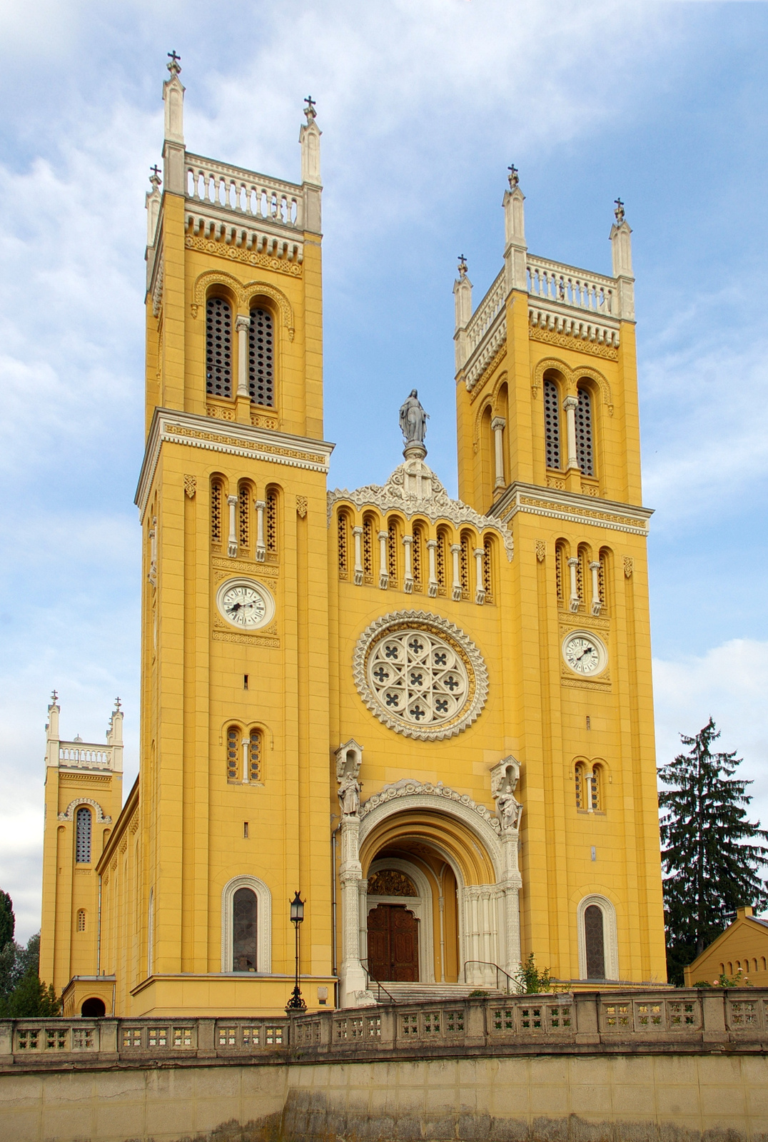 Szeplőtelen Fogantatás Római katolikus templom (Fót, Vörösmarty u.) This is a photo of a monument in Hungary. Identifier: 7024